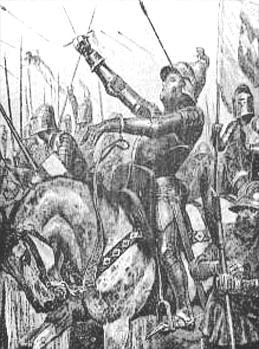 Henry Percy(1364i1366–1403)